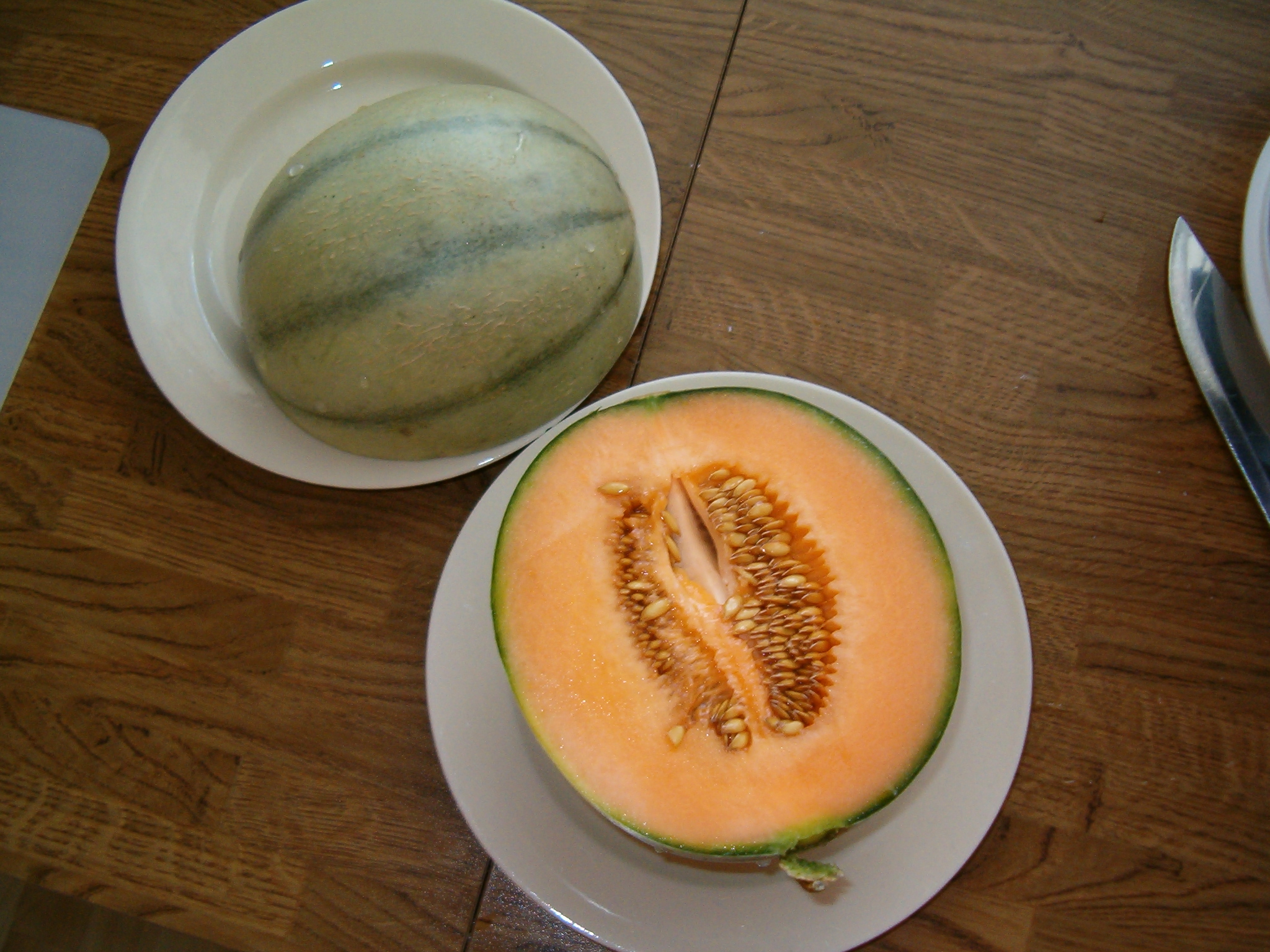 Beschreibung: Charentais-Melone aufgeschnitten